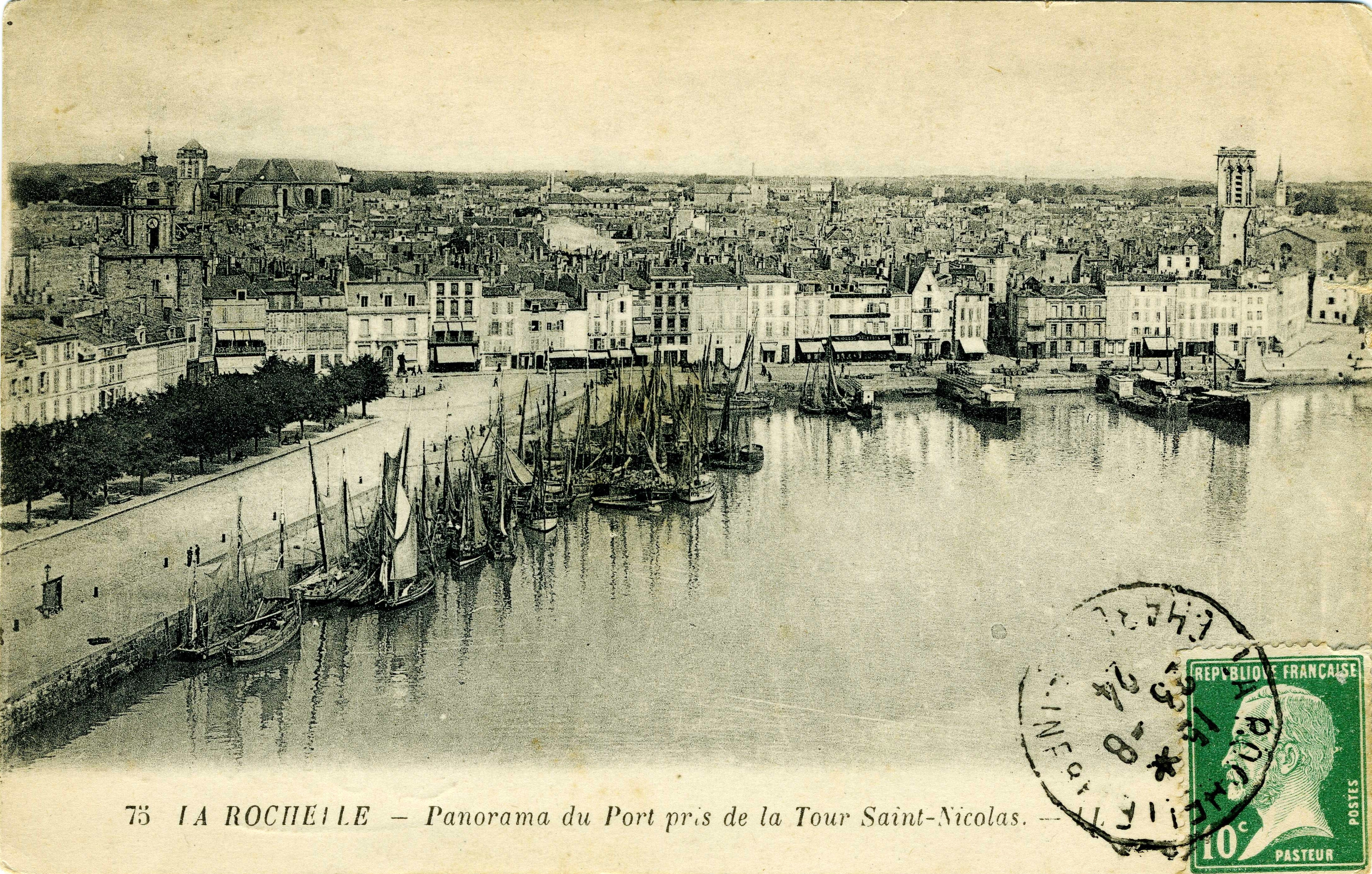 Vue générale du port de La Rochelle et de la ville prise depuis la tour Saint-Nicolas. La Rochelle, Charente Maritime, France. Fin des années 1910 ou début des années 1920.